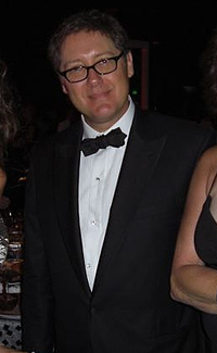 james spader from boston legal